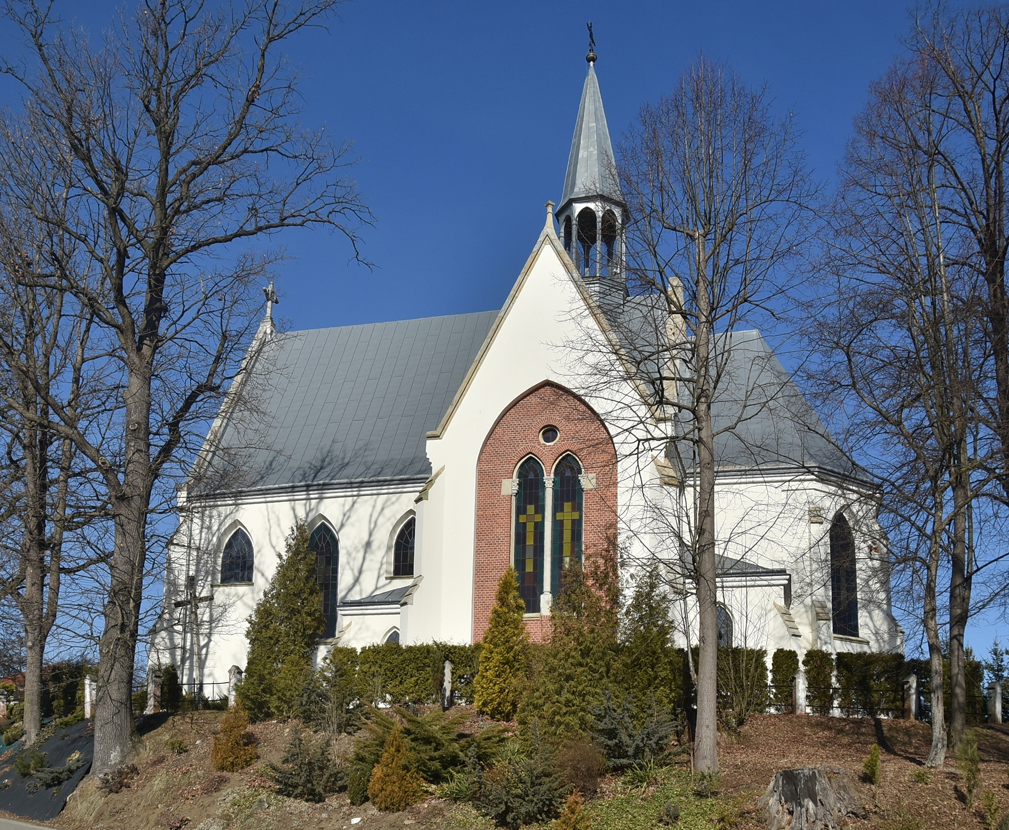 Harklowa, Zespół kościoła św. Doroty